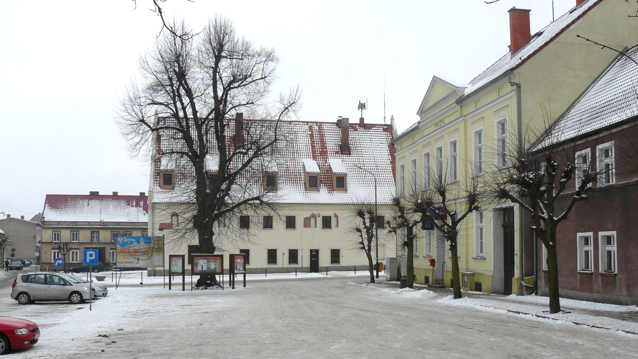 Rynek - Trzcińsko Zdrój.